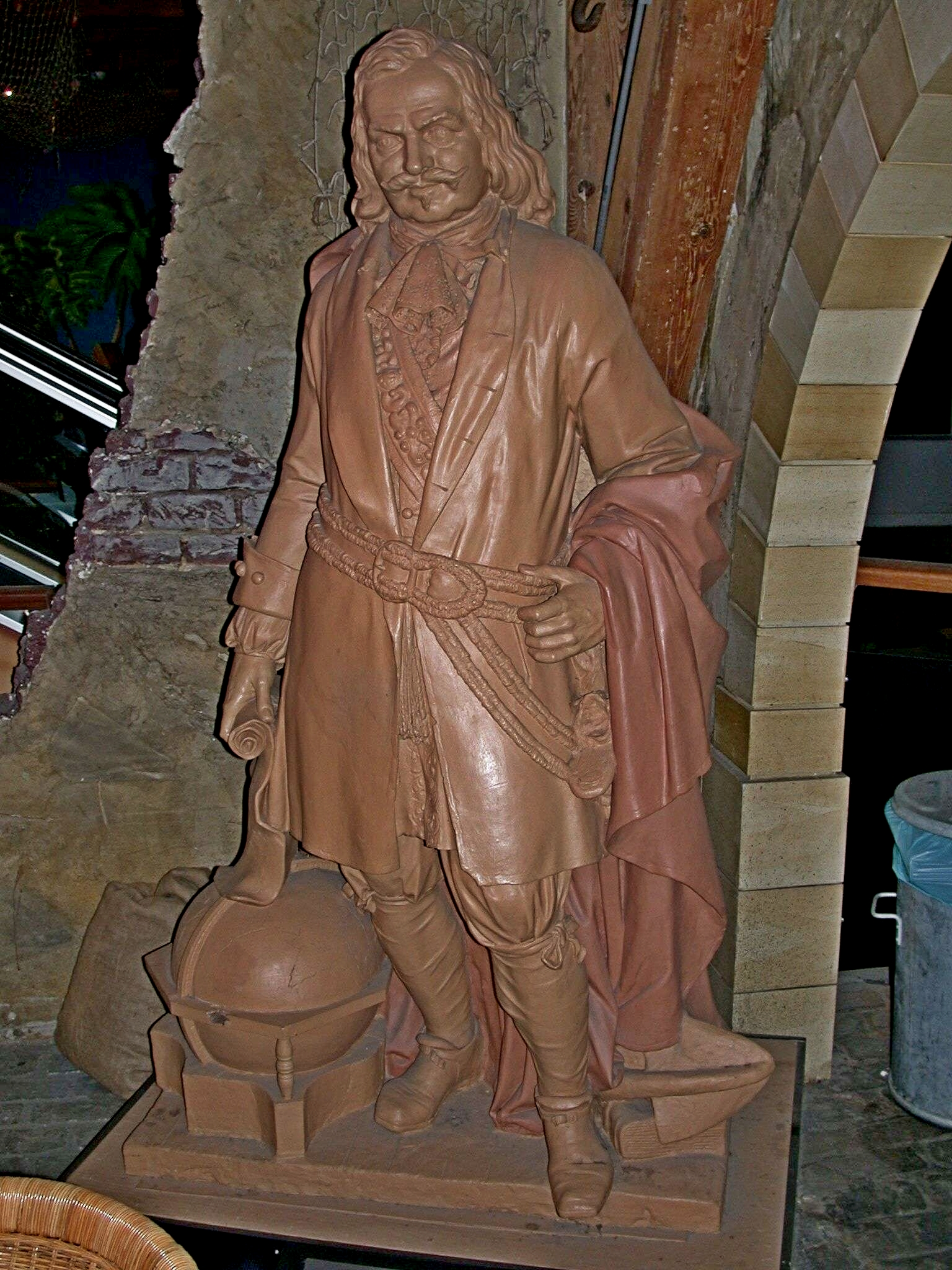 Vervaardigd in 1858 door J. Verdonck. Afkomstig uit het voormalige Zeemanshuis in Amsterdam.